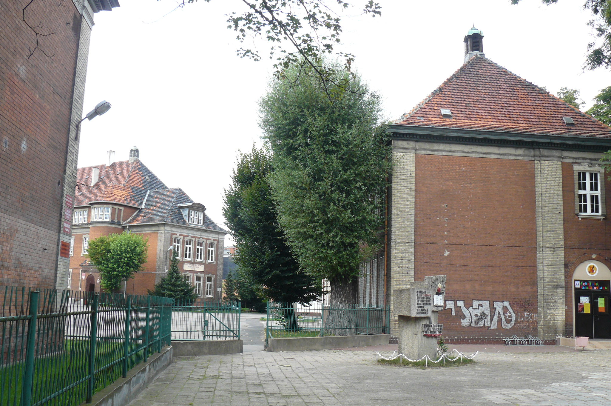 Poznań Łazarz - zespół zabudowań szkolnych (zabytek nr A 258).